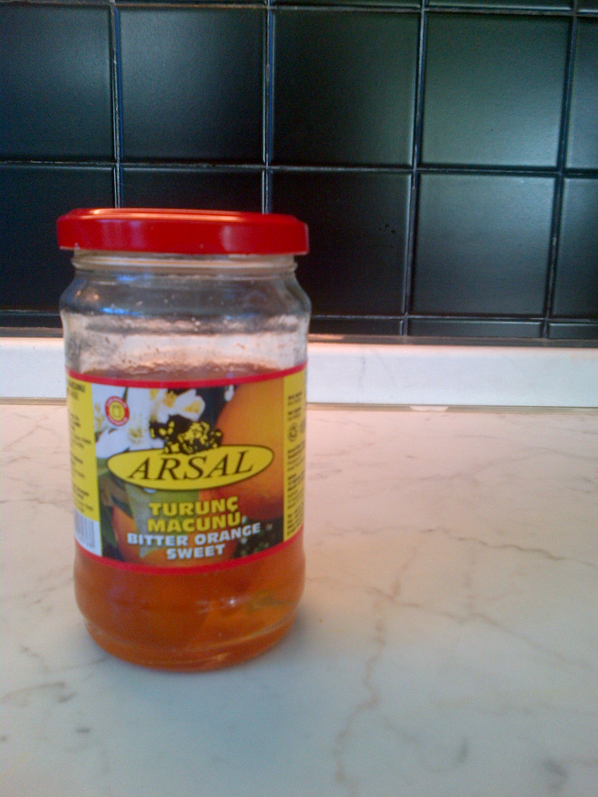 "Macun" (dulce tipo mermelada) de naranja amarga de la RTNC.